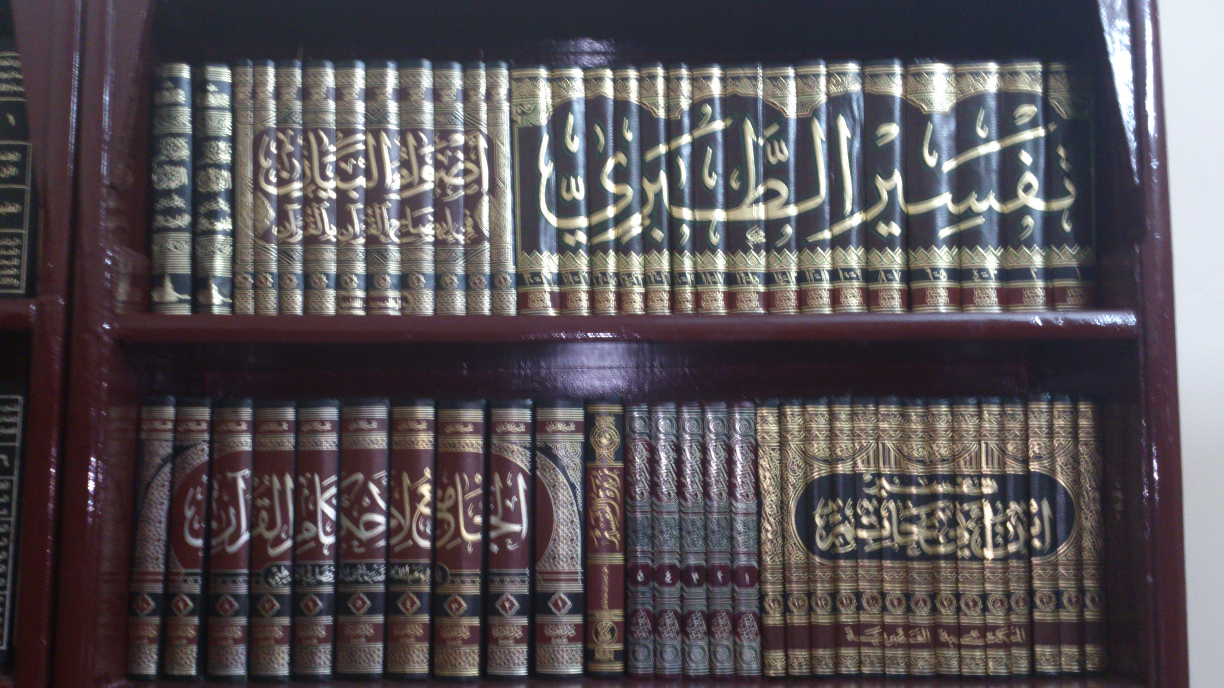 كتب : تفسير الطبري ، وابن أبي حاتم ، والقرطبي ، وأضواء البيان